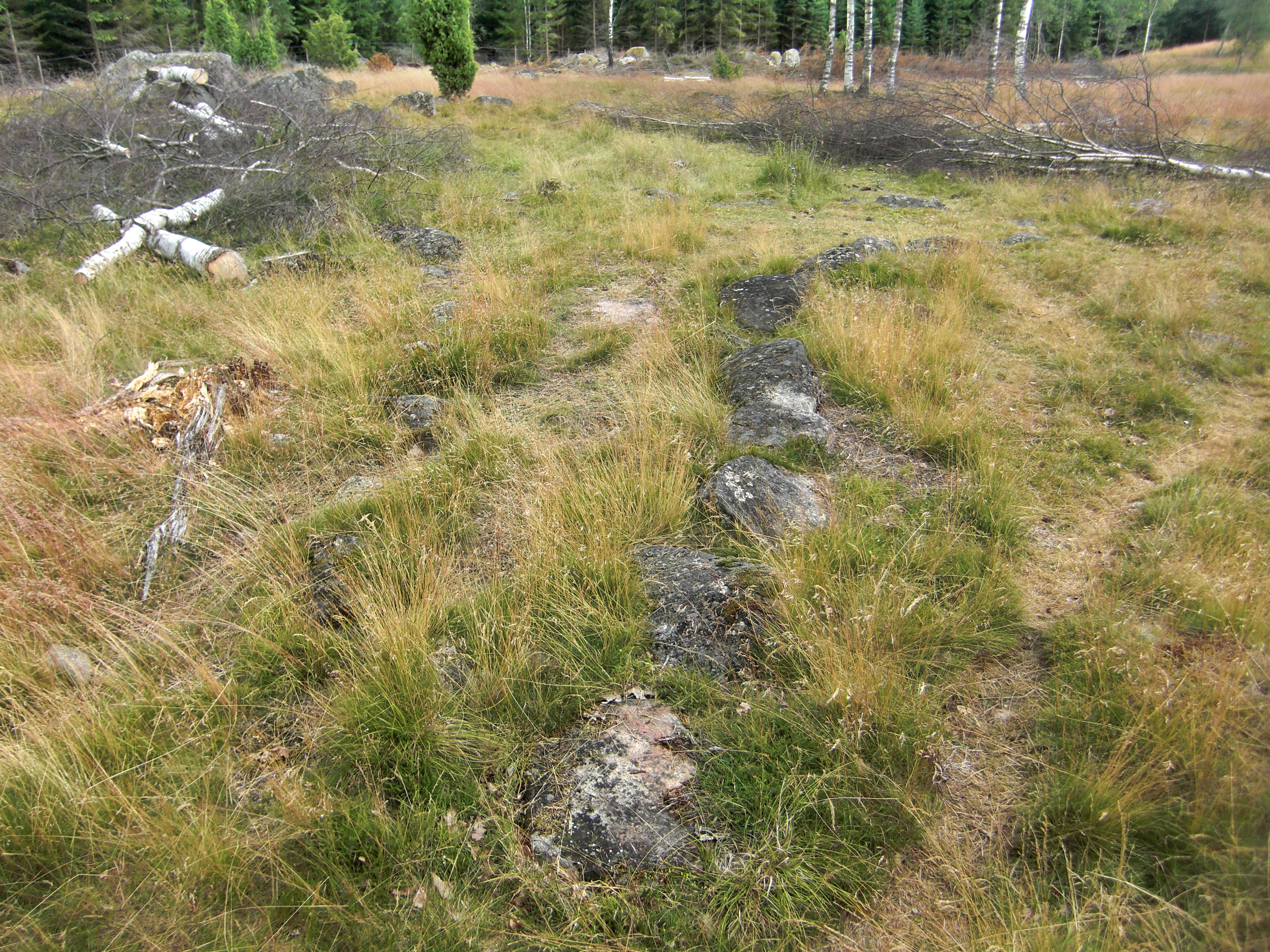 Treudd på Orraryds gravfält (Raä-nr Nöbbele 3:1) i Nöbbele socken i Konga härad i Värend, Växjö kommun, Kronobergs län, Småland, Sverige.